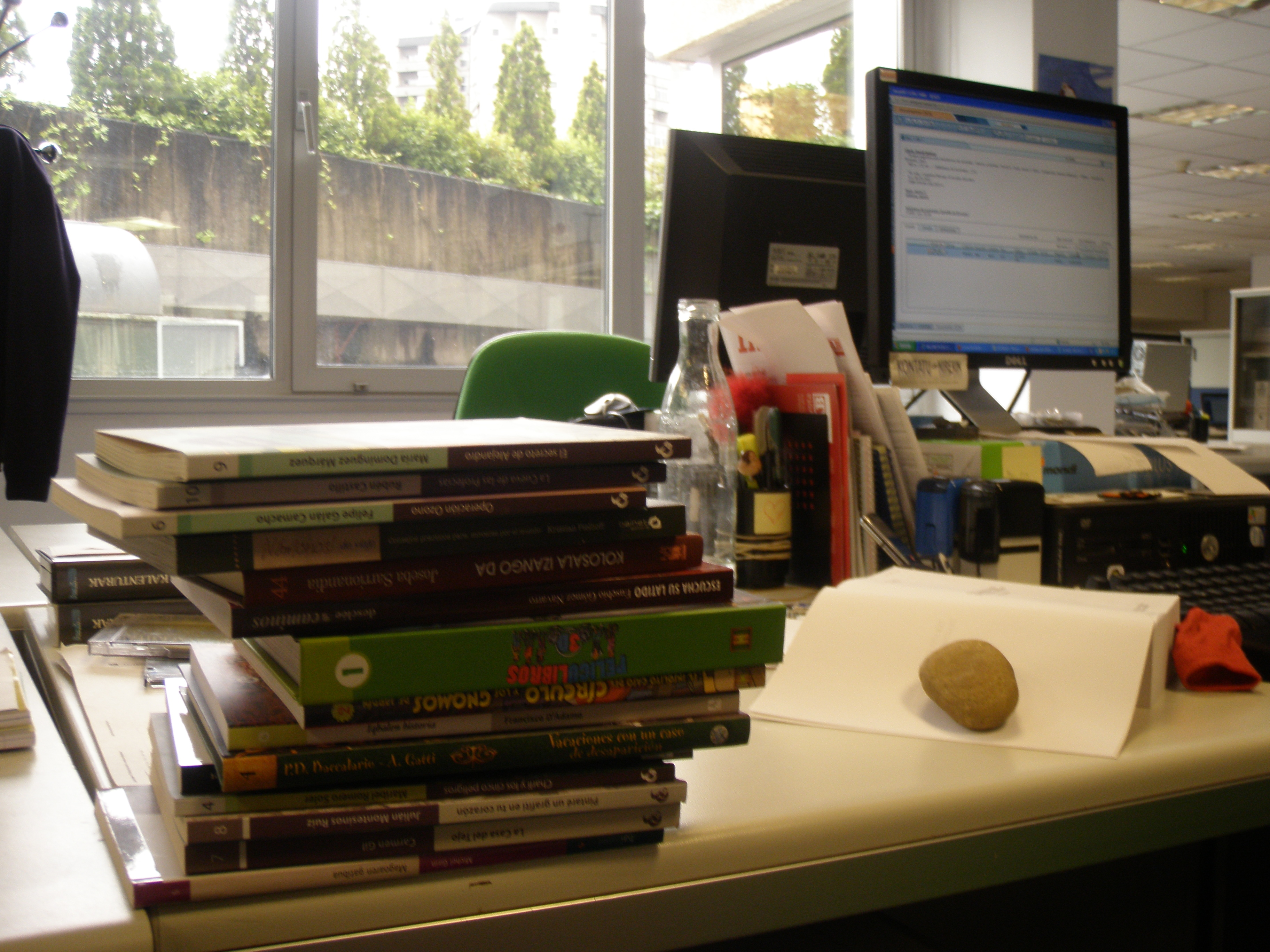 Katalogazioa